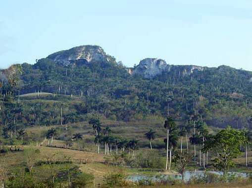 Escaleras de Jaruco Cuba